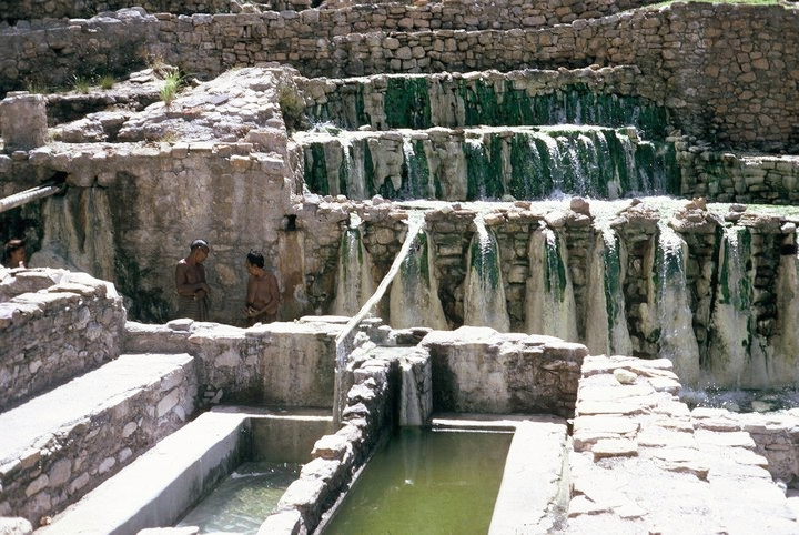 Outro aspecto das nascentes de águas sulfurosas quentes